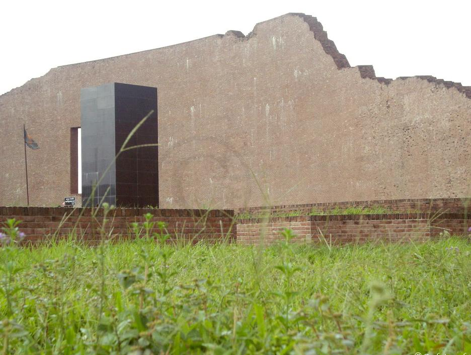 Buddhijibi Sriti Soudho, Rayer Bazar, Dhaka, Bangladesh.